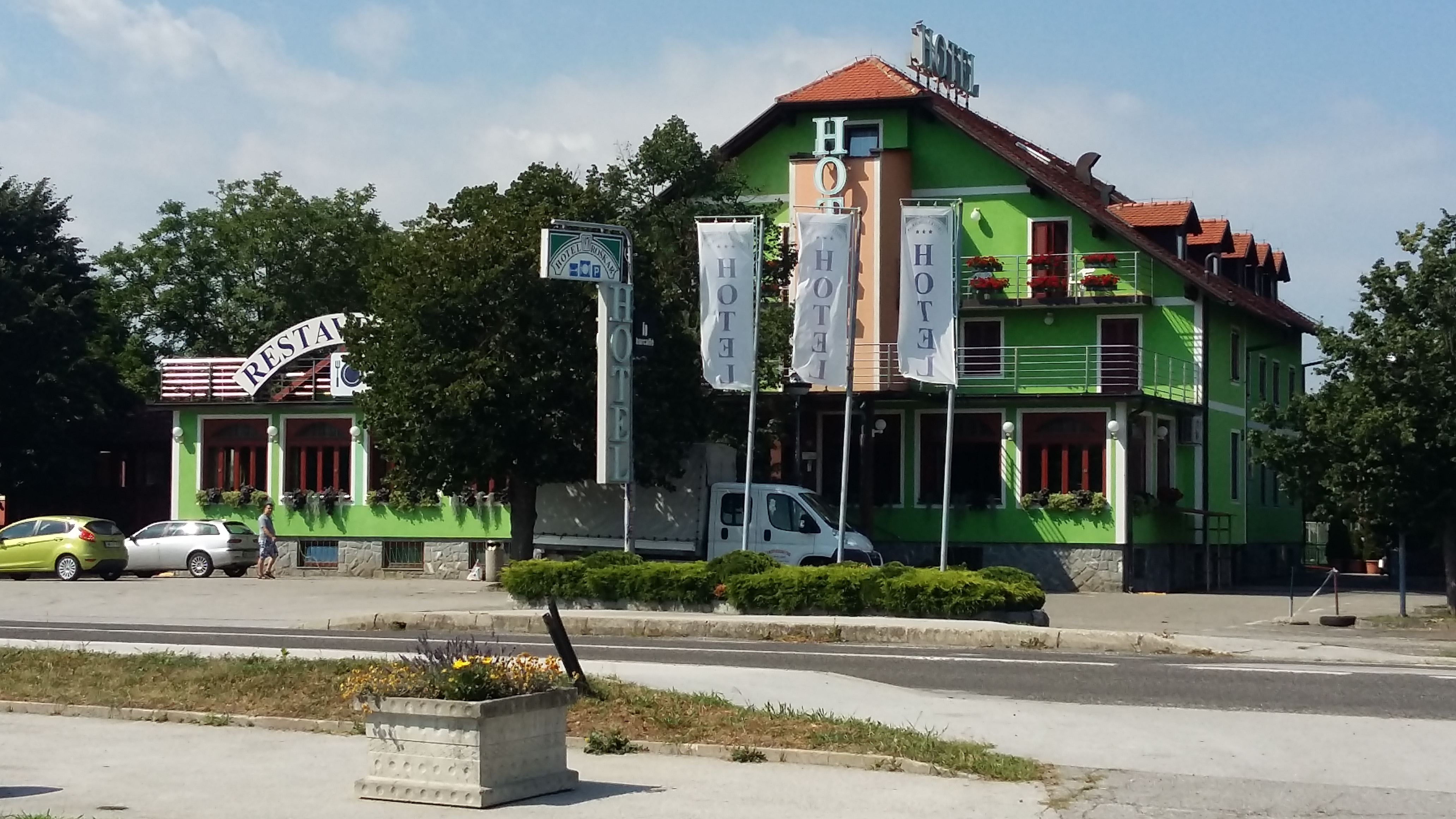 Hotel